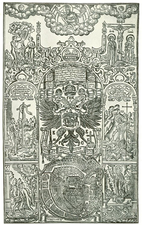 Московская Библия, фронтиспис